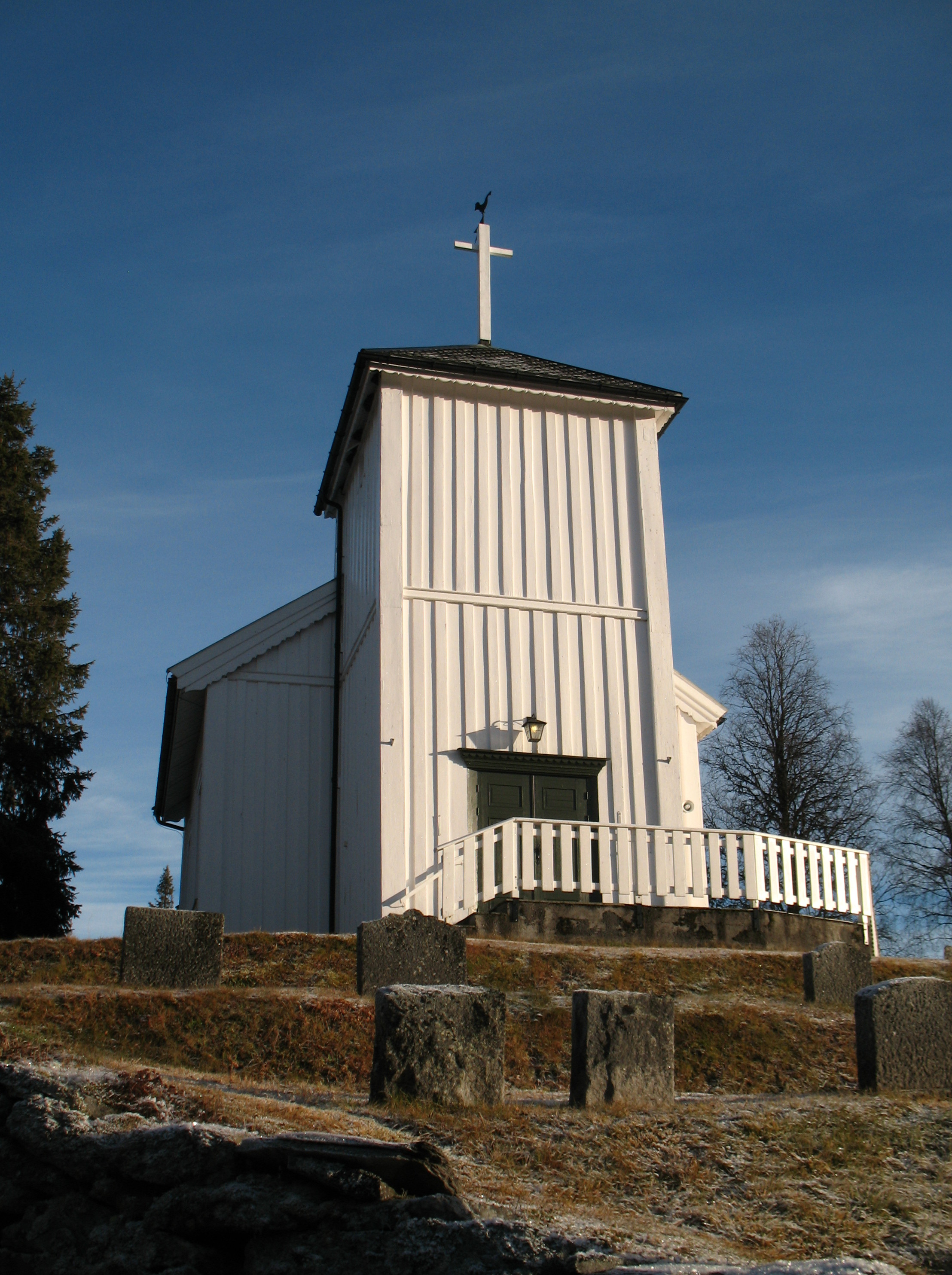 Øyfjell kyrkje er ei langkyrkje i tre frå 1833 som står i Vinje kommune i Telemark, Agder og Telemark bispedømme; Vest-Telemark prosti. Sett frå vest.